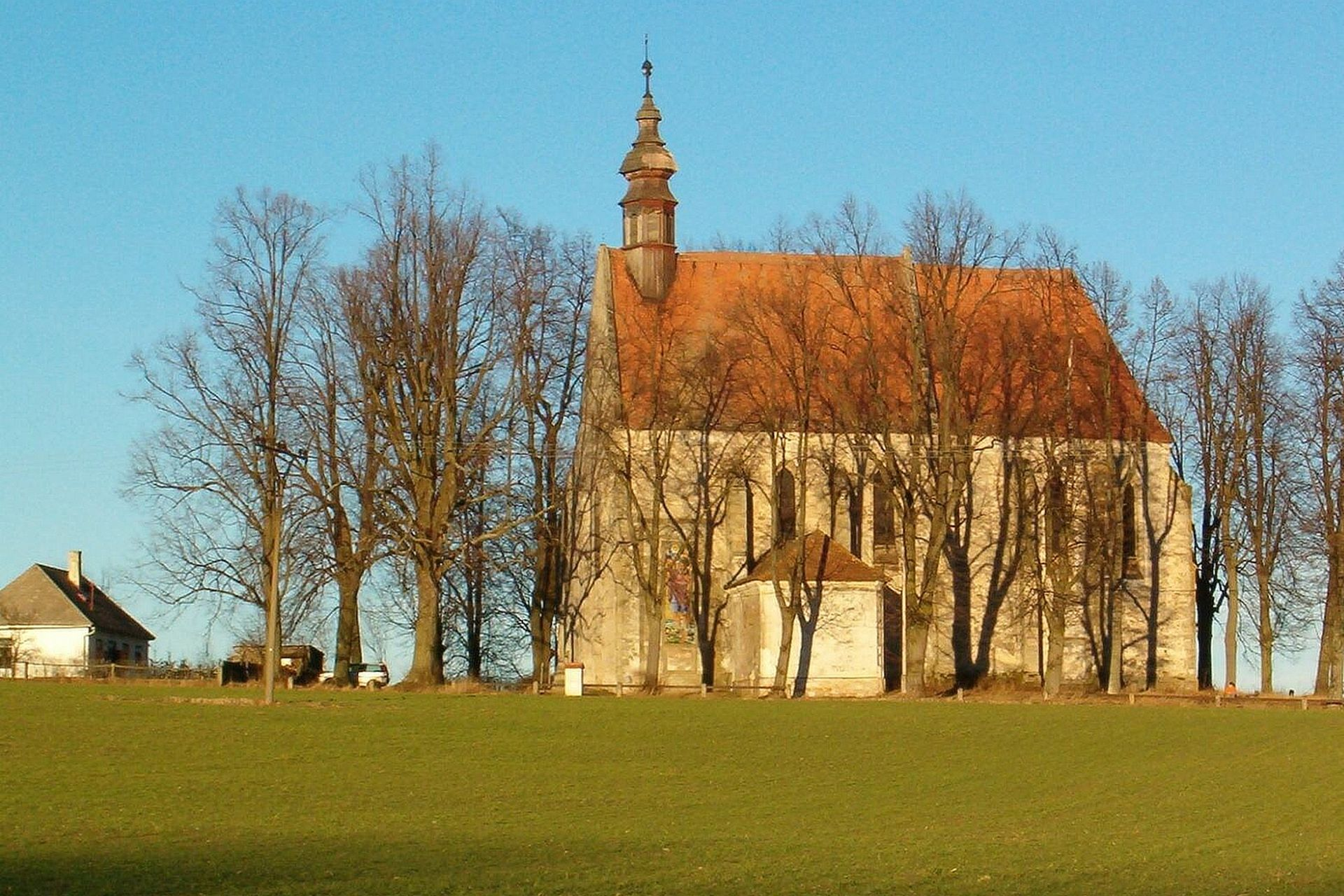 Kostel Božího Těla ve Slavonicích